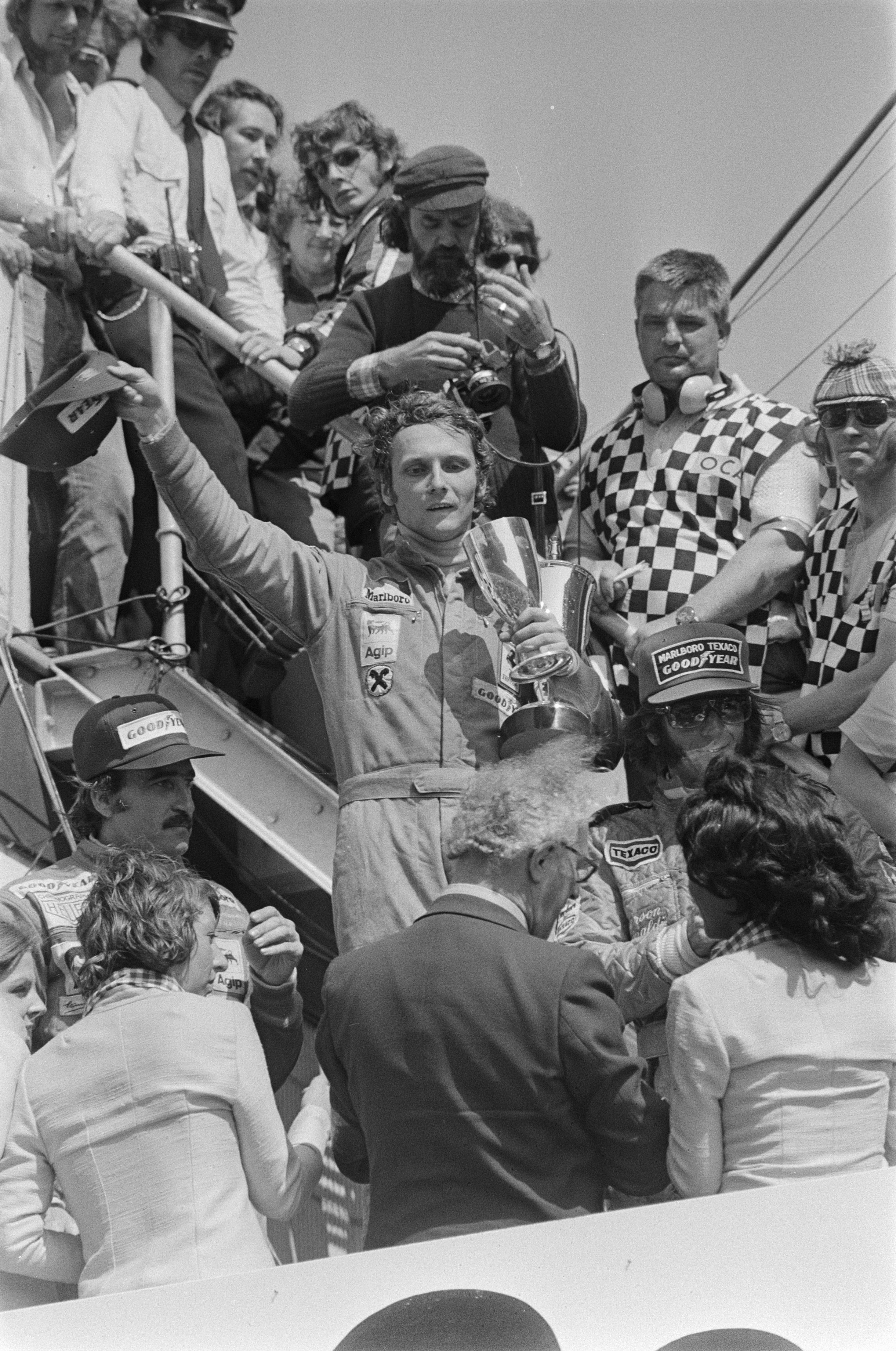 Collectie / Archief : Fotocollectie Anefo Reportage / Serie : [ onbekend ] Beschrijving : Grand Prix op Zandvoort, Niki Lauda (Oostenrijk) tijdens huldiging Datum : 23 juni 1974 Locatie : Noord-Holland, Zandvoort Trefwoorden : autoraces, huldigingen Persoonsnaam : Lauda, Niki Fotograaf : Croes, Rob C. / Anefo Auteursrechthebbende : Nationaal Archief Materiaalsoort : Negatief (zwart/wit) Nummer archiefinventaris : bekijk toegang 2.24.01.05 Bestanddeelnummer : 927-2750